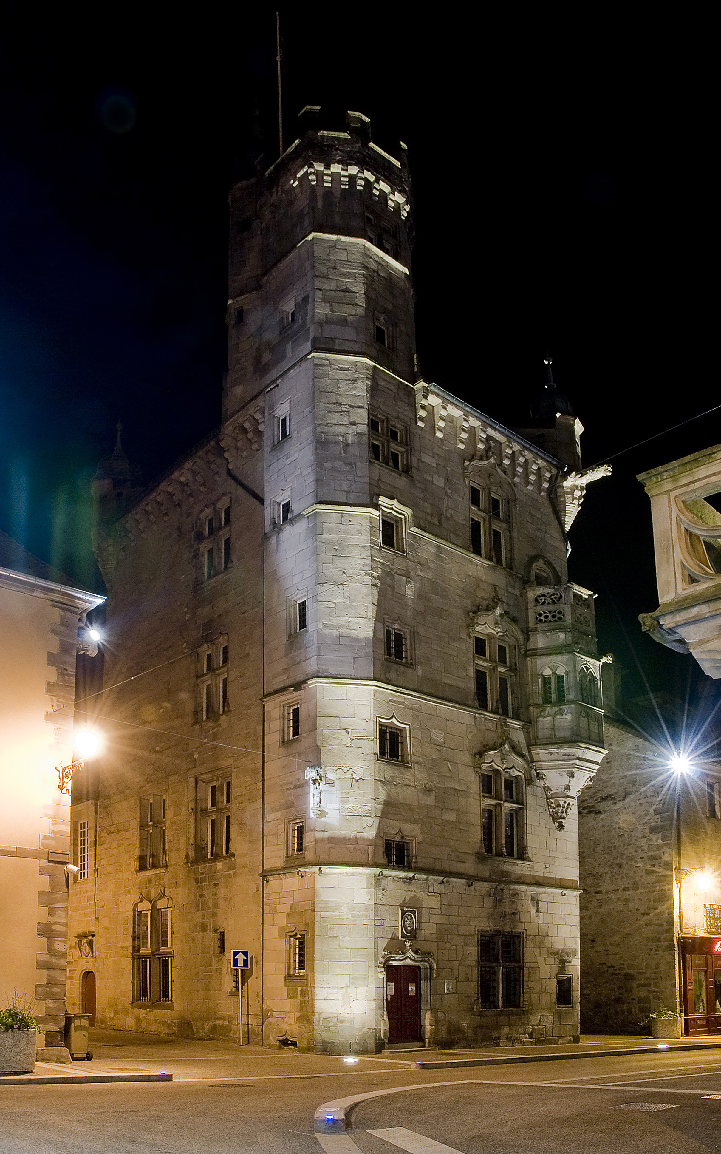 Cet édifice a été construit dans la deuxième moitié du XVème siècle, par Henri Jouffroy, second fils de Perrin, frère du Cardinal. D’abord loué, il fut acquis en 1552 par les notables de la ville, pour abriter les fonctions communales. Fleuron du patrimoine civil luxovien, il s’élève sur quatre étages, s’ouvrant sur un bel escalier latéral de 146 marches, menant à une tour octogonale. Il abrite de nos jour un musée qui est l’un des plus anciens de France : c’est par une délibération datée du 22 janvier 1673, que le Conseil de la ville prit la résolution de « recueillir les antiques trouvés sur son territoire, et de les déposer à l’Hôtel de Ville ». .